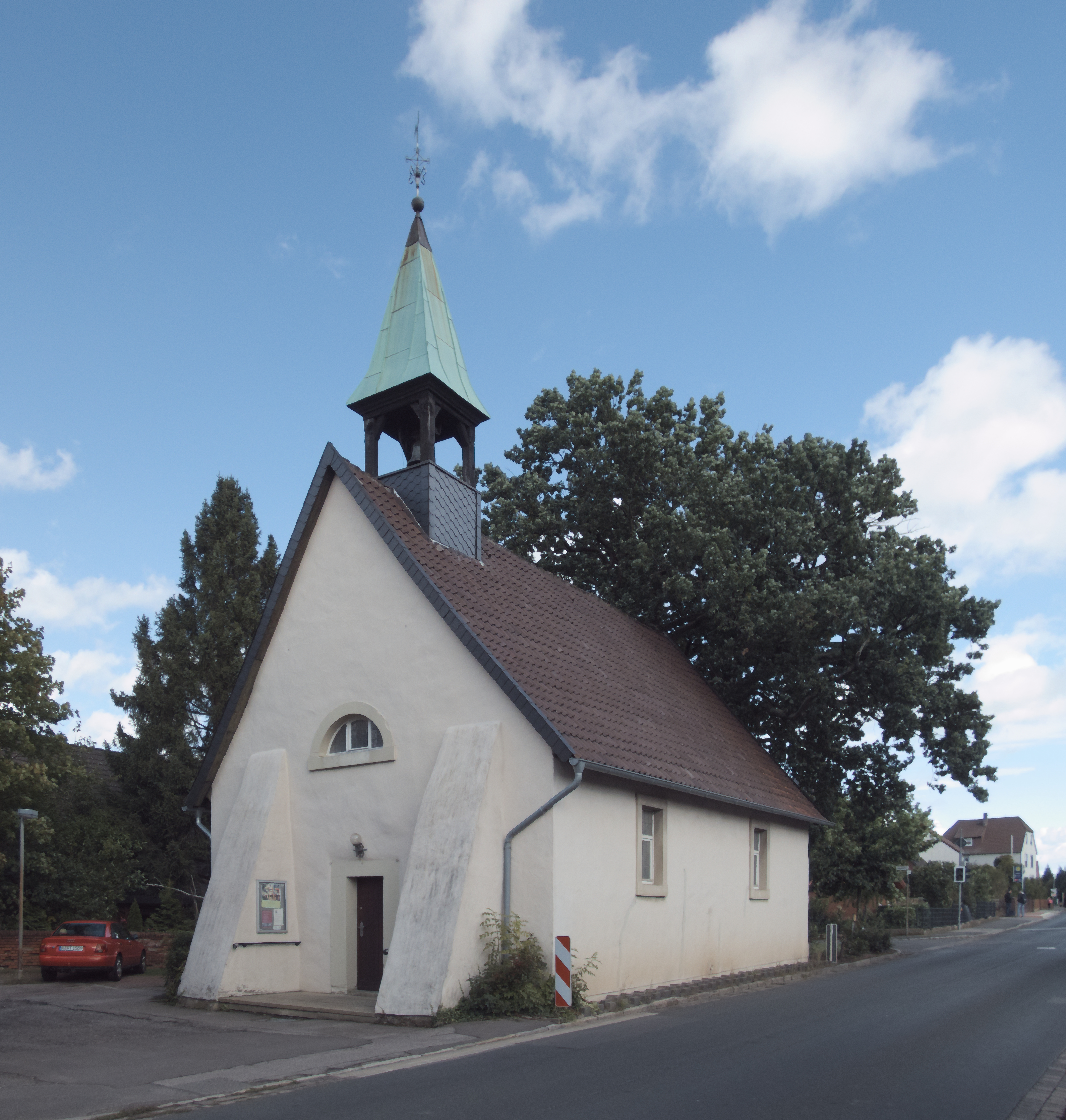 Die Kapelle im Barsinghäuser Stadtteil Langreder